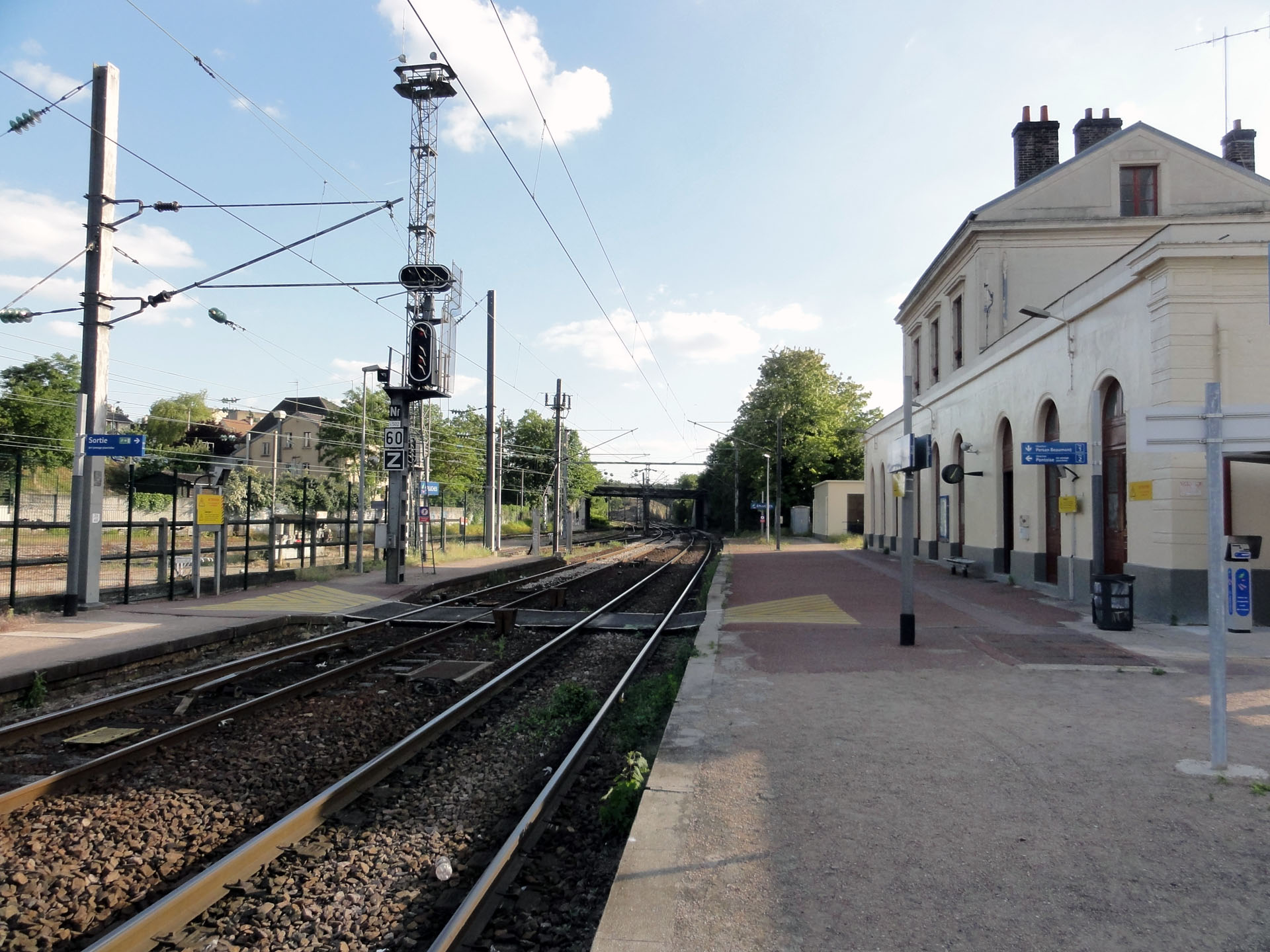 La gare d'Épluches à Saint-Ouen-l'Aumône, Val-d'Oise, France.